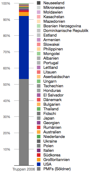 Die Grafik beschreibt die Anzahl und Herkunft der im Irak stationierten Truppen im Jahr 2006, inklusive Mitarbeiter privater Sicherheits- und Militärunternehmen.